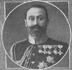 Fotografía del militar e inventor español Venancio López de Ceballos publicada en 1912 con motivo de que la pistola de su invención fuera declarada reglamentaria para el Ejército